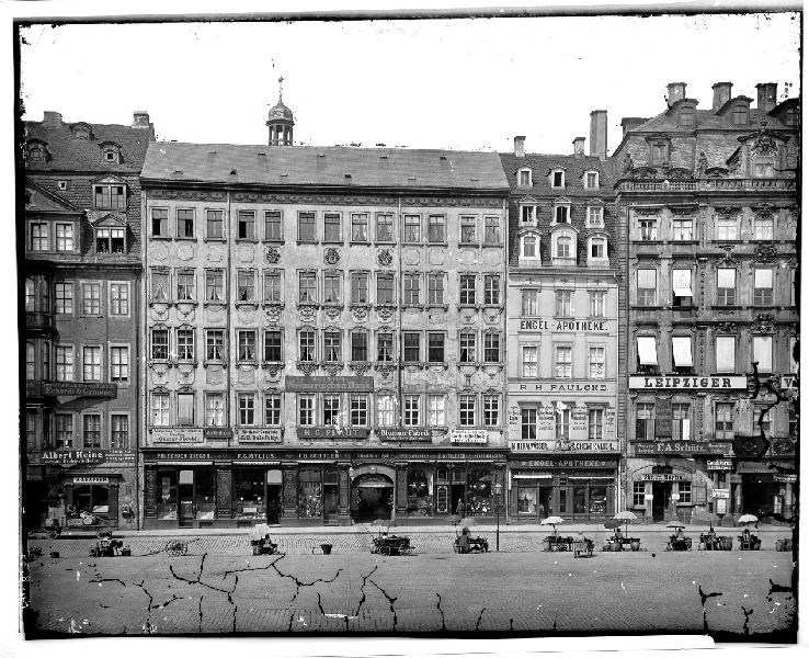 Stieglitzens Hof (Markt 13) und Engel-Apotheke (Markt 12) vor 1891.